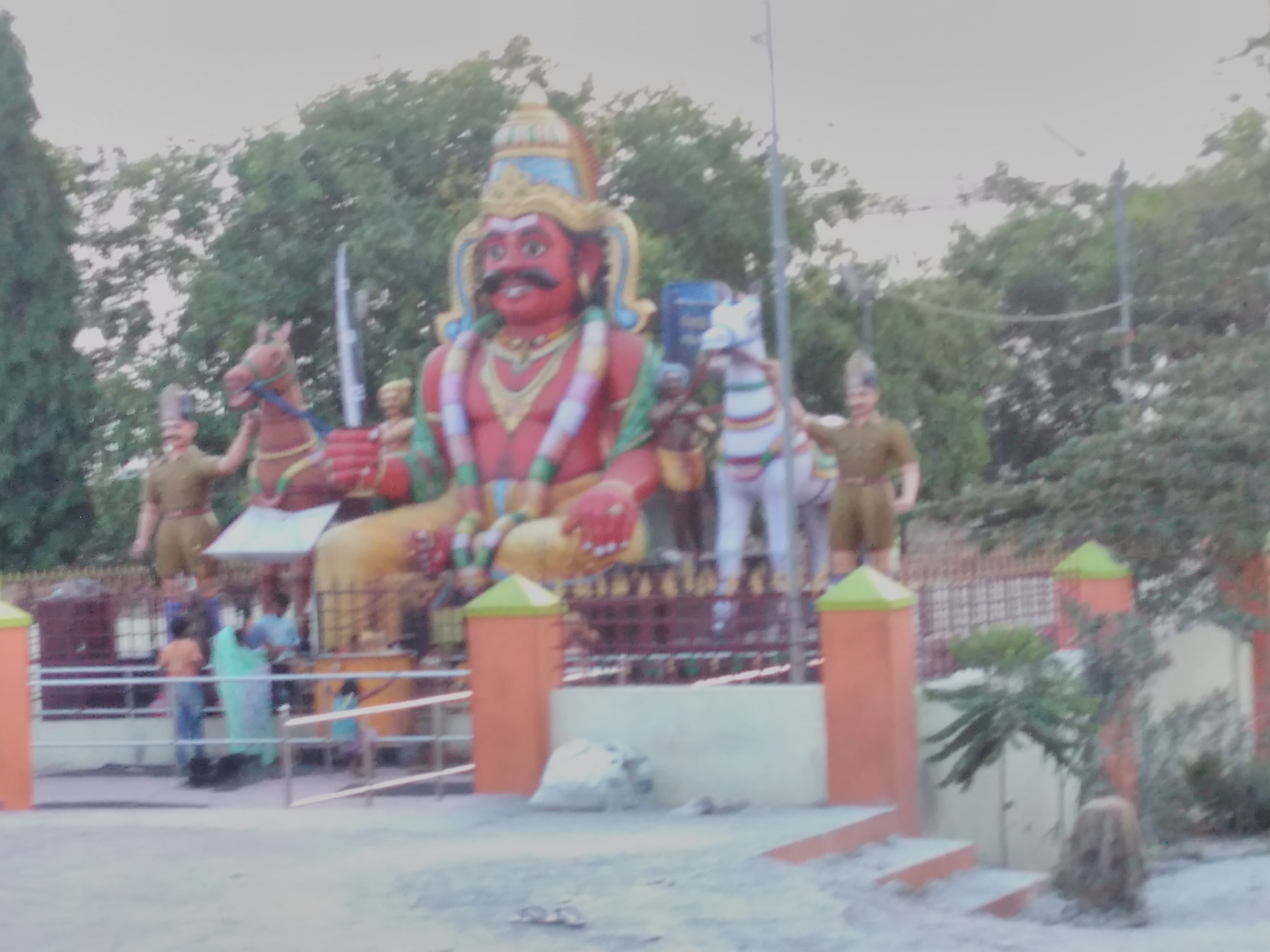 பி.அக்ராகரம் முனியப்பன் கோவில்